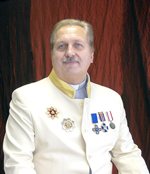 пастор, письменник, художник, відомий громадський та культурний діяч